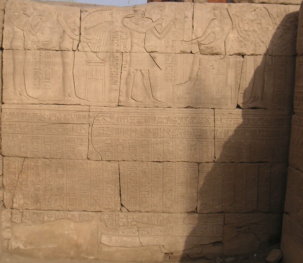 Relief de la porte d'accès au temple de Mout à Karnak représentant Ptolémée III accompagné de musiciennes - Le roi agite des sistres devant la déesse Mout suivie de la déesse Sekhmet - Dynastie ptolémaïque